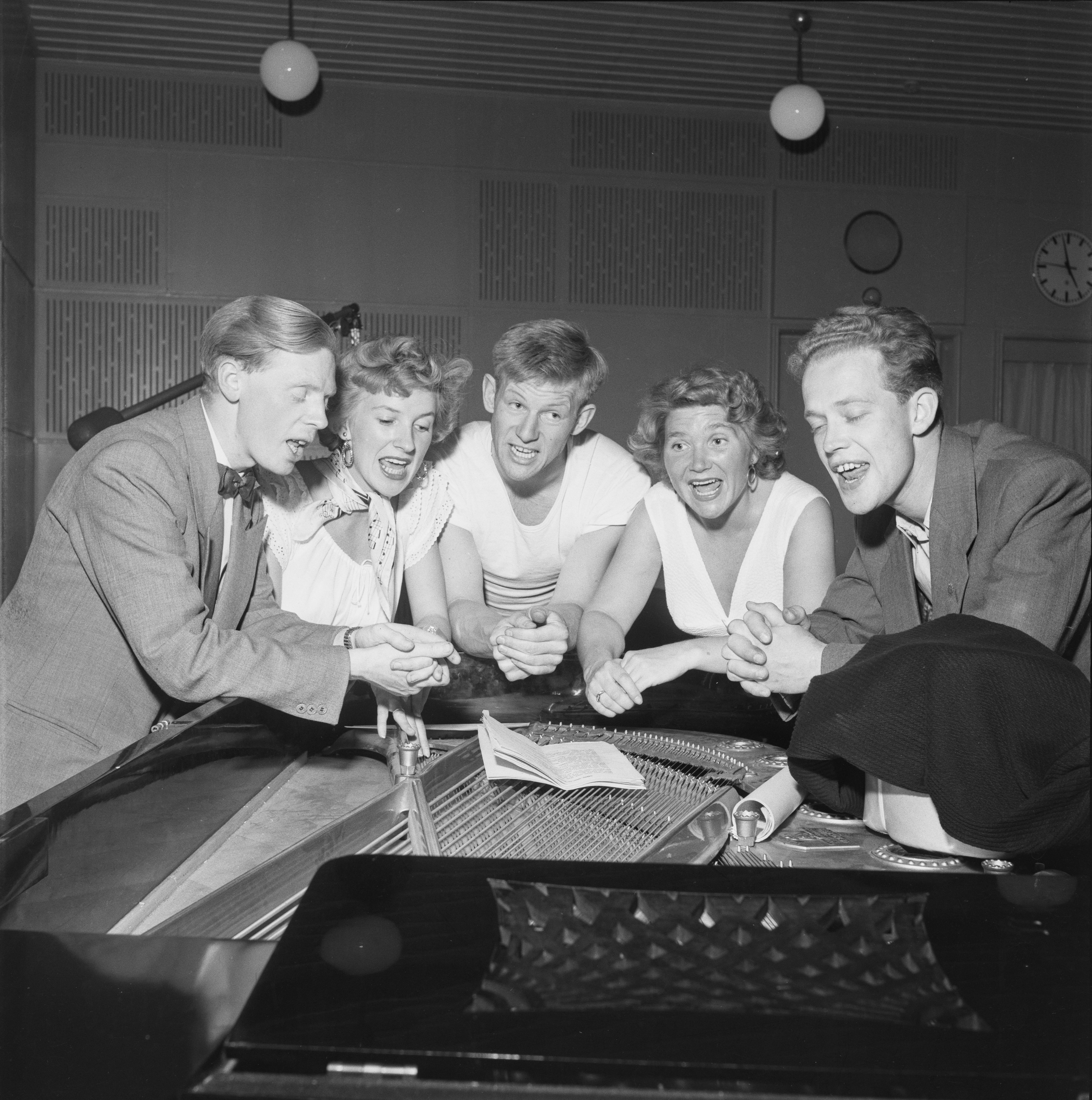 Bildet er hentet fra Arkivverket. The Monnkeys. NÅ nr. 18, 1954 Arkivinstitusjon : Riksarkivet Arkivnavn : Billedbladet NÅ Sted : Norge, Ukjent, Ukjent, Ukjent Emneord: Musikkgrupper, Band Avbildet